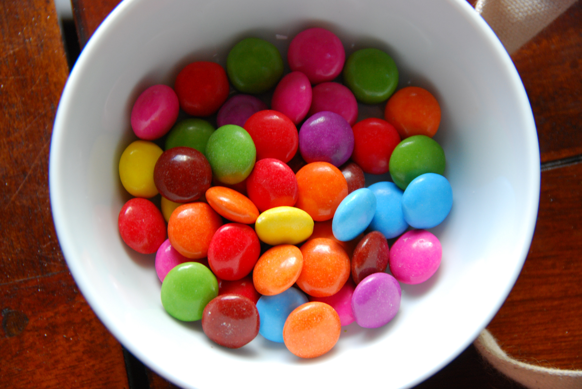 Smarties